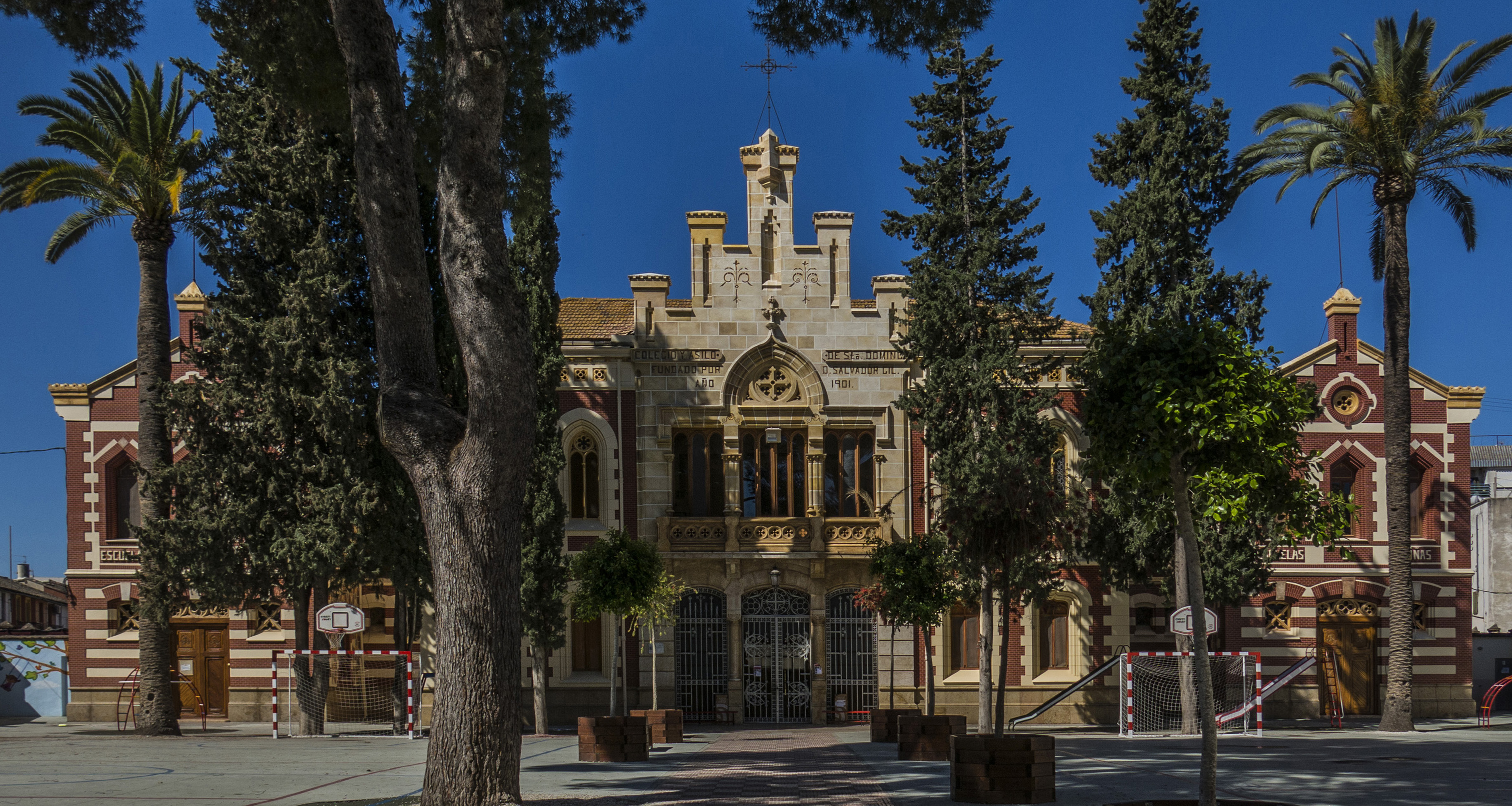 Antic convent. Obra de Joaquín María Arnau Miramón. Castelló de la Ribera és un municipi de la Ribera Alta, del País Valencià.